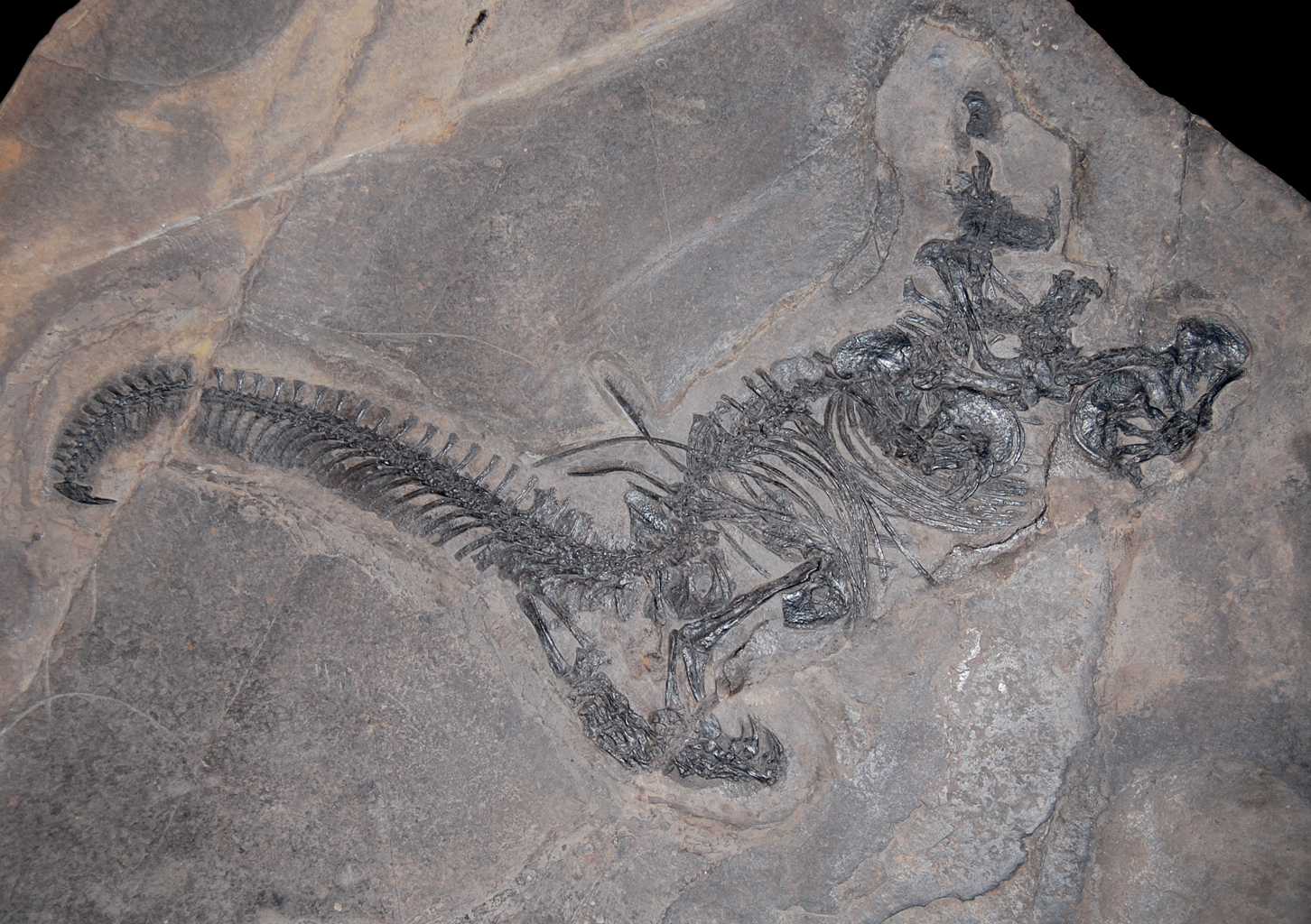 Museo civico di scienze naturali di Bergamo